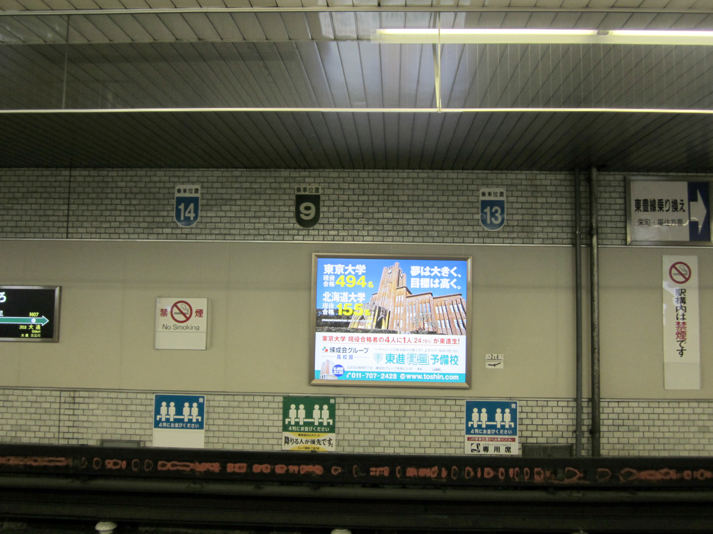 2000・3000形の緑の乗車口と5000形の青の乗車口、2012年4月時点で緑の乗車口が使われることはなくなり、やがて表示も撤去される。